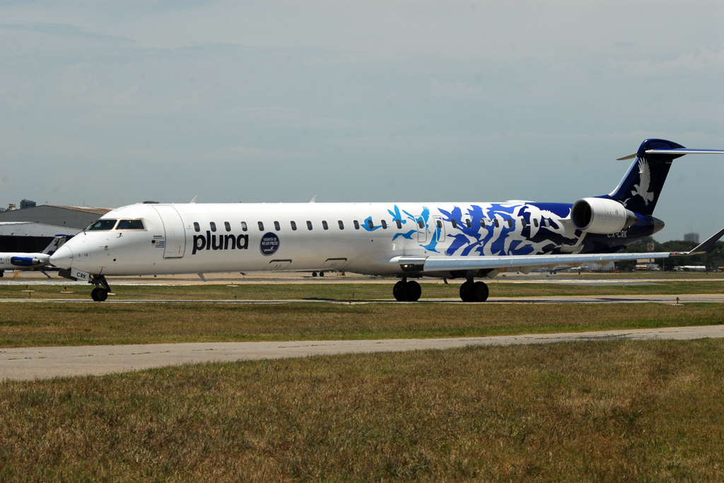 PLUNA CX-CRK Canadair CRJ-900 msn 15239 seen at Buenos Aires Aeroparque (AEP/SABE).